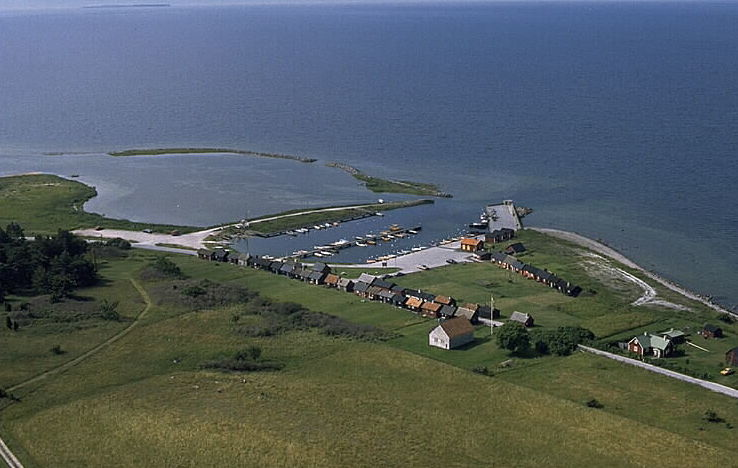 Motiv: Gnisvärd fiskeläge Nyckelord: Flygbilder, Riksintressen Kategori: FiskelägeGnisvärd fiskeläge